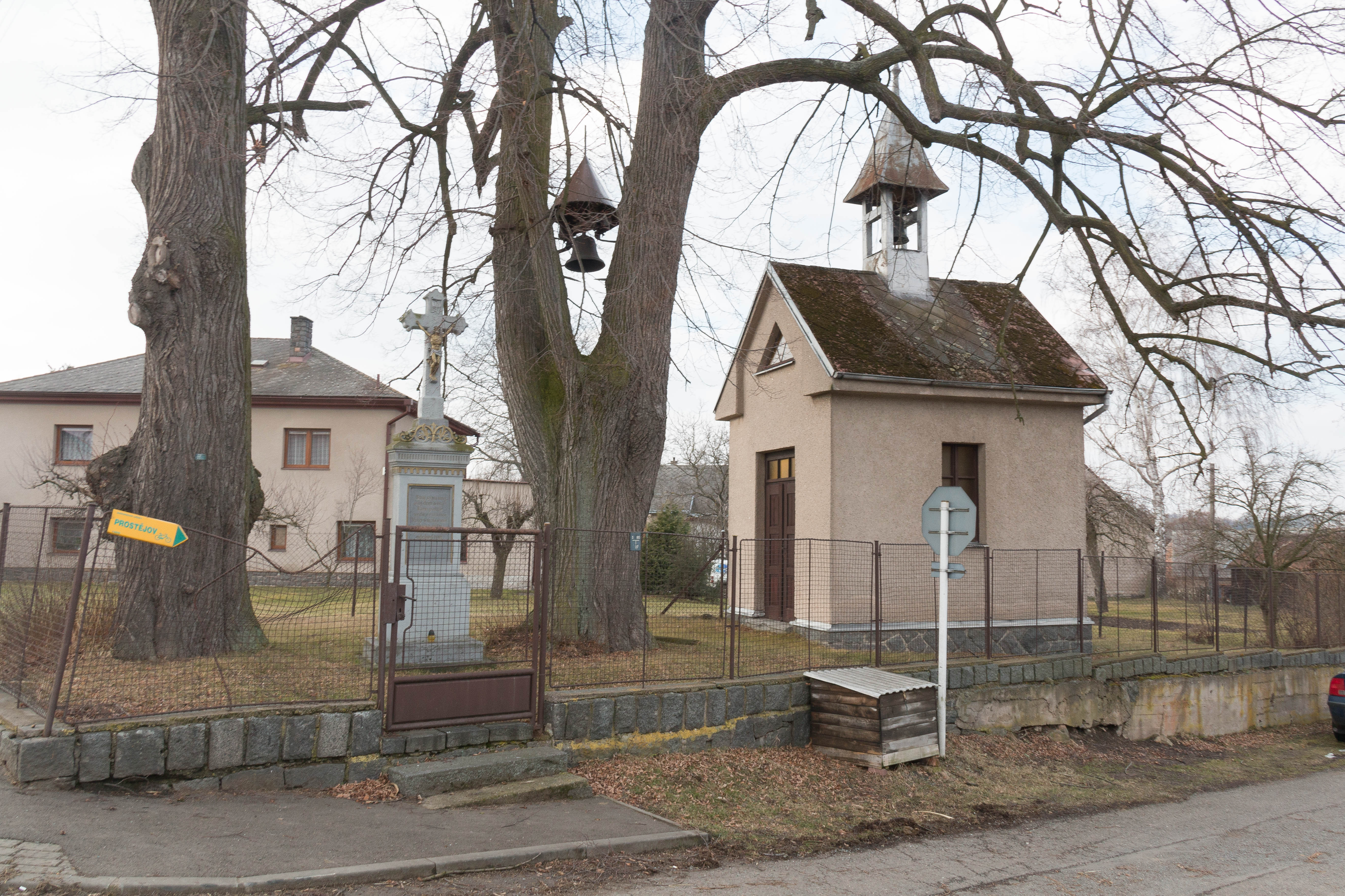 Švihov u Miřetic kaple